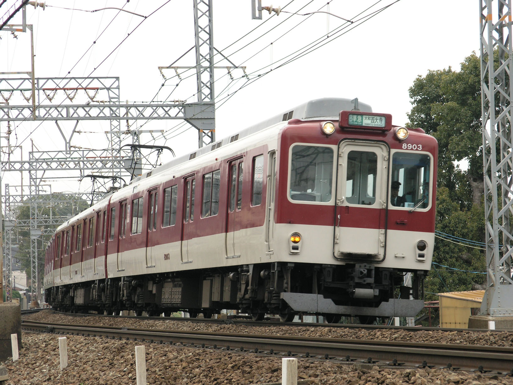 近鉄8800系電車